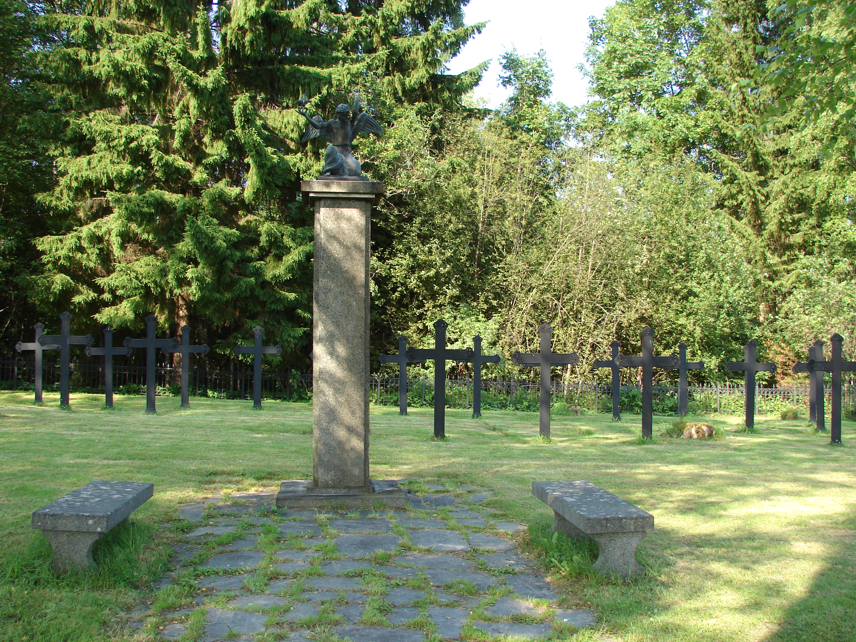 Familien Aals gravsted ved Romnes Kirke, Telemarken